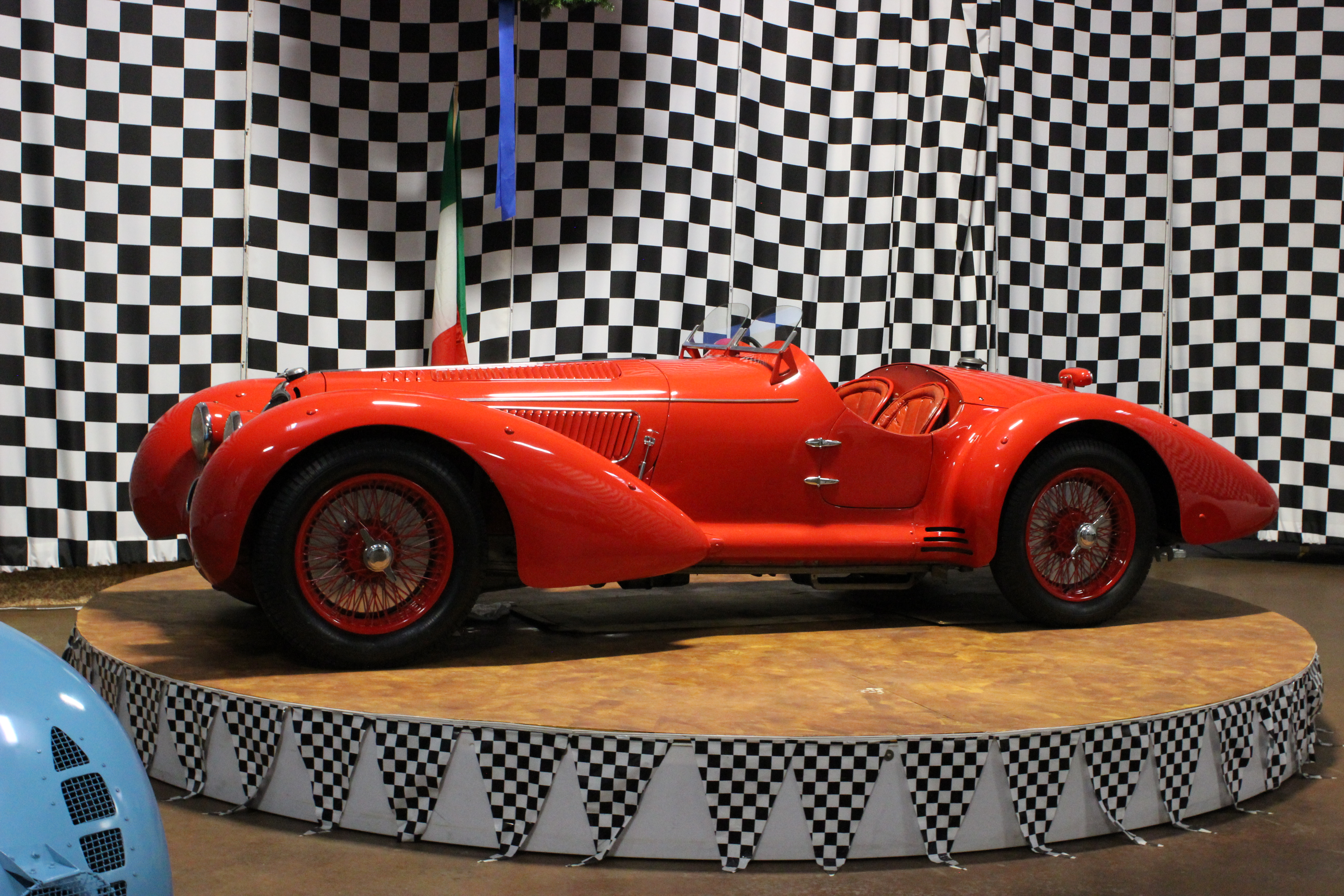 Alfa Romeo 8C MM